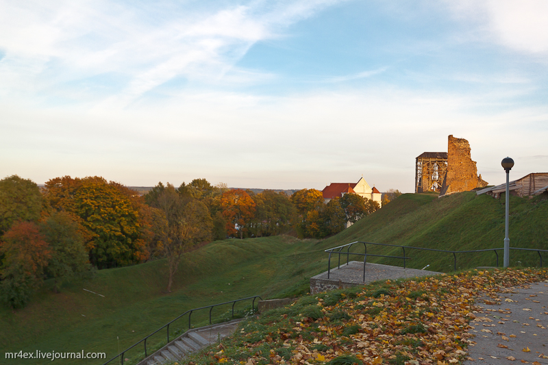 Навагрудак. Краявід